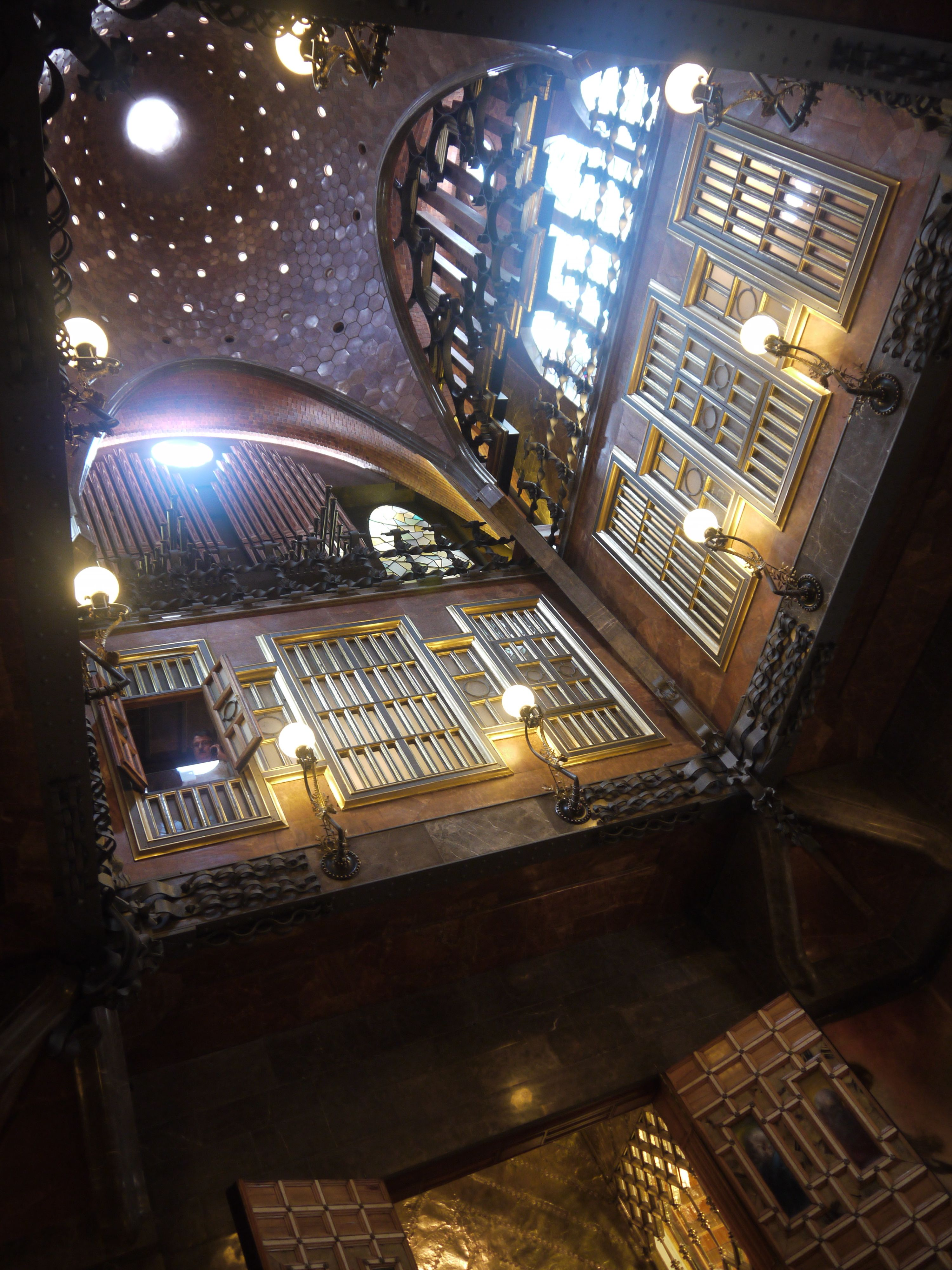 Palau Güell, Barcelona, calle Nou de la Rambla. Recientemente restaurado, este edificio impresiona por la imaginación, la distribución de los espacios y la atención a los detalles del maestro Gaudi. Fue, en su día, residencia de la familia Güell.